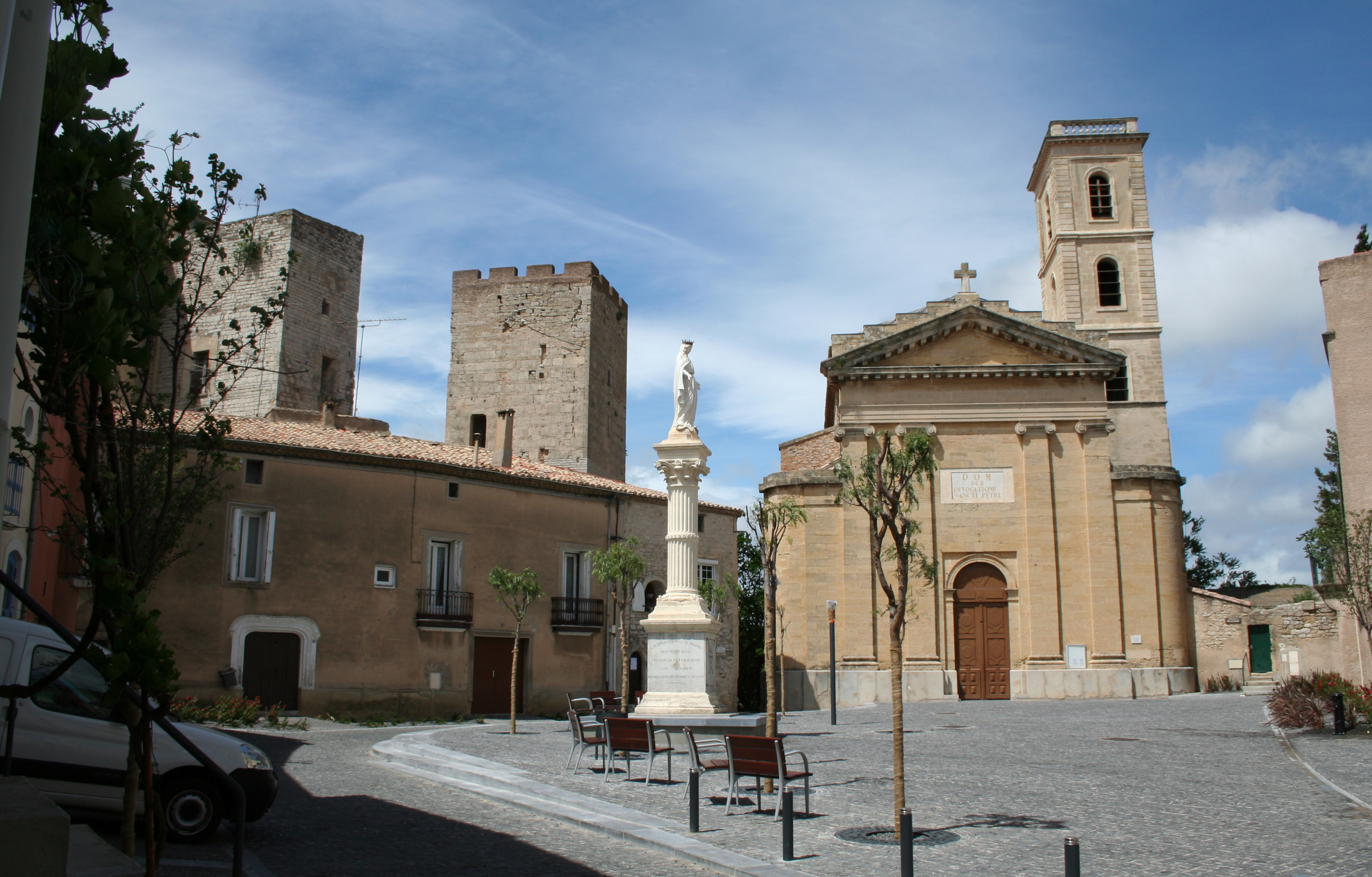 Cournonterral (Hérault) - Église Sainte-Croix et Tour.